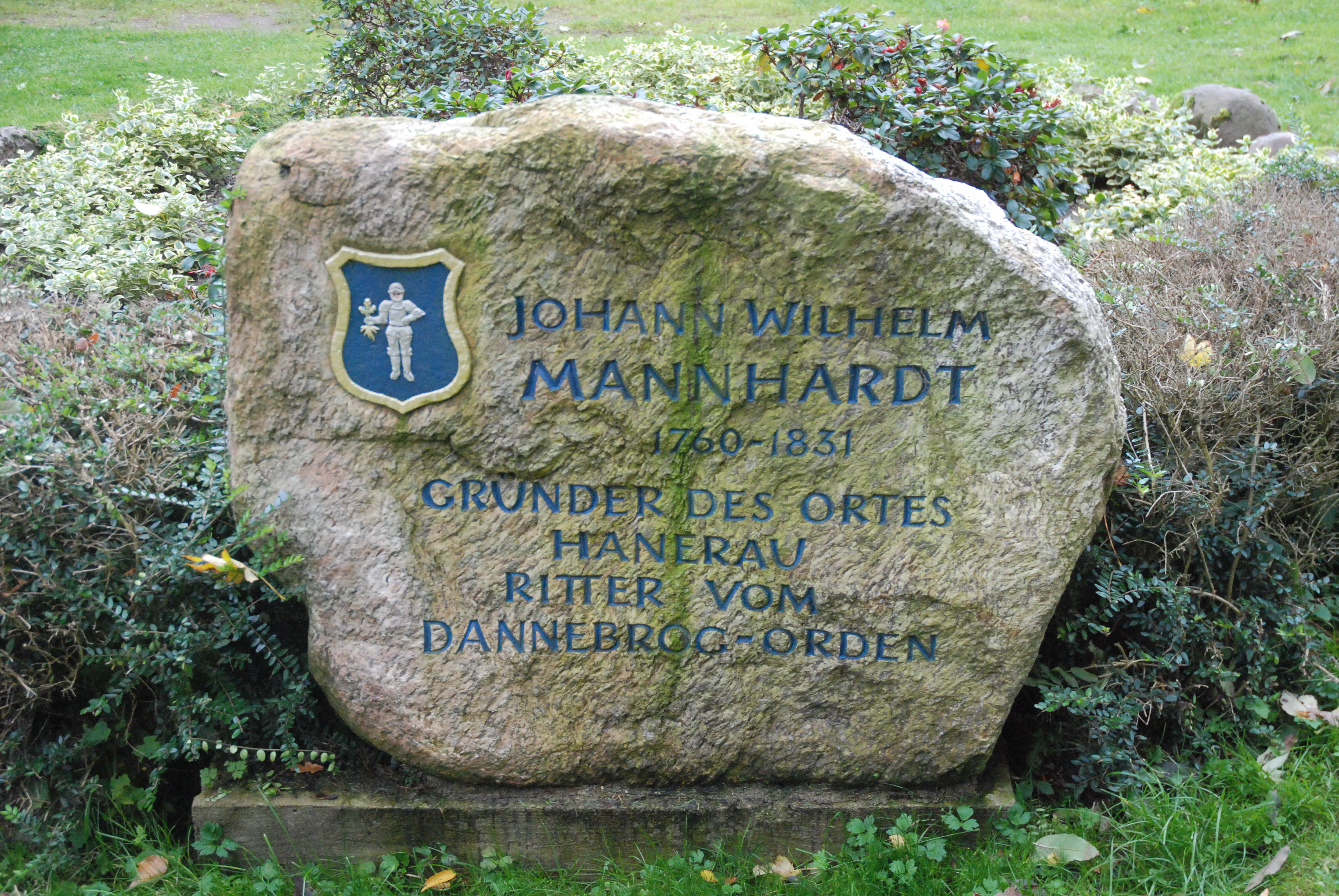 Mannhardt-Gedenktstein auf der Gutsinsel